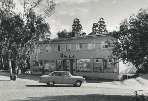 I samband med uppförandet av bostäder på Kvarnholmen åren kring 1930 etablerades - den 31 oktober 1928 - en Konsumbutik. År 1955 byggdes butiken om till snabbköp och nyårsafton 1977 upphörde affärsverksamheten.